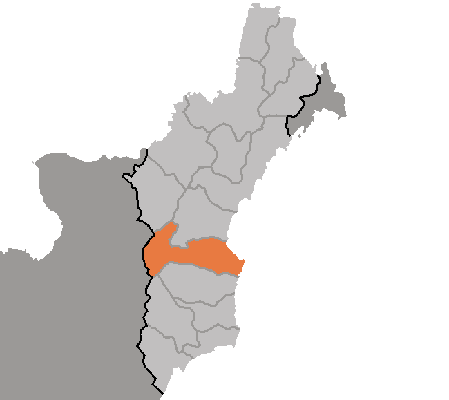 Map of Orang, Hamgyong-pukto, DPRK, 2006